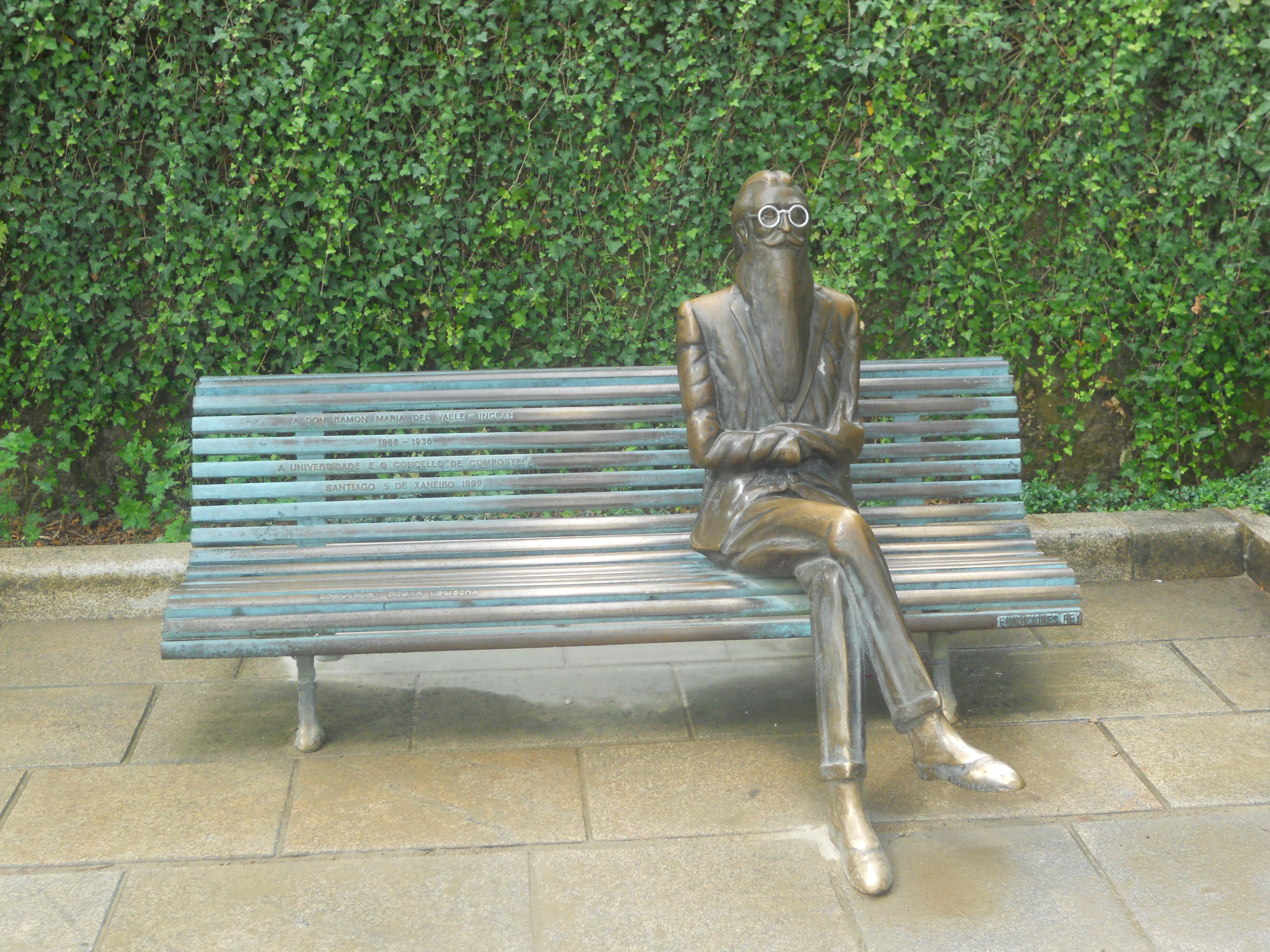 Estatua de Ramón María del Valle-Inclán en Santiago de Compostela.